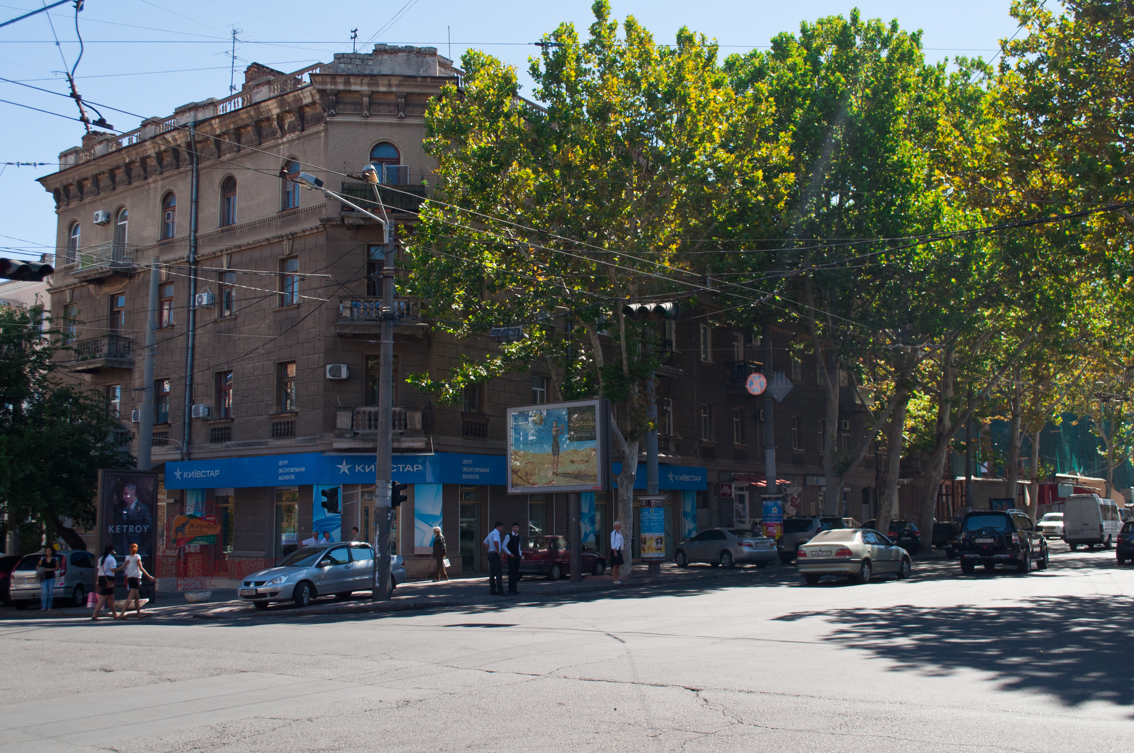 Будинок, в якому жив І.Д. Бурмаков - Герой Радянського Союзу, генерал-лейтенант